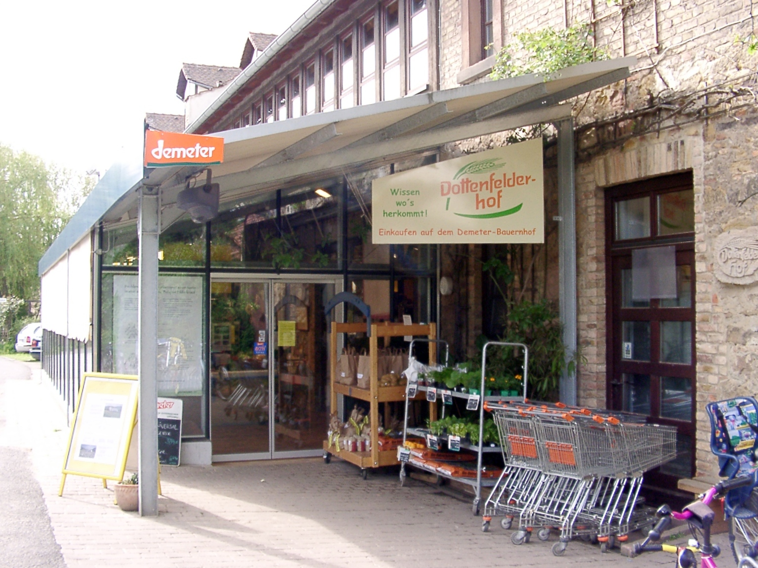 Hofladen des Dottenfelderhofs